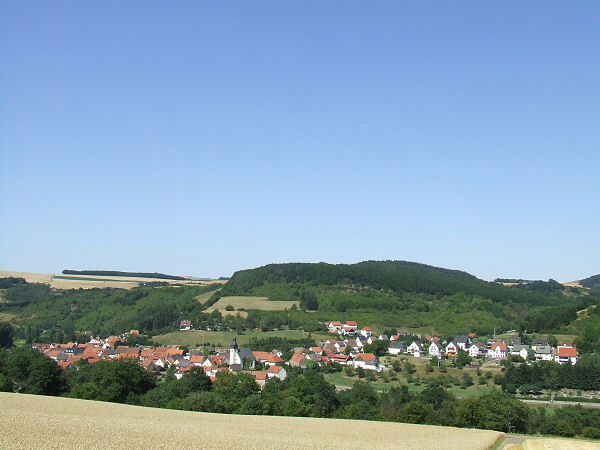 Dielkirchen 2007.